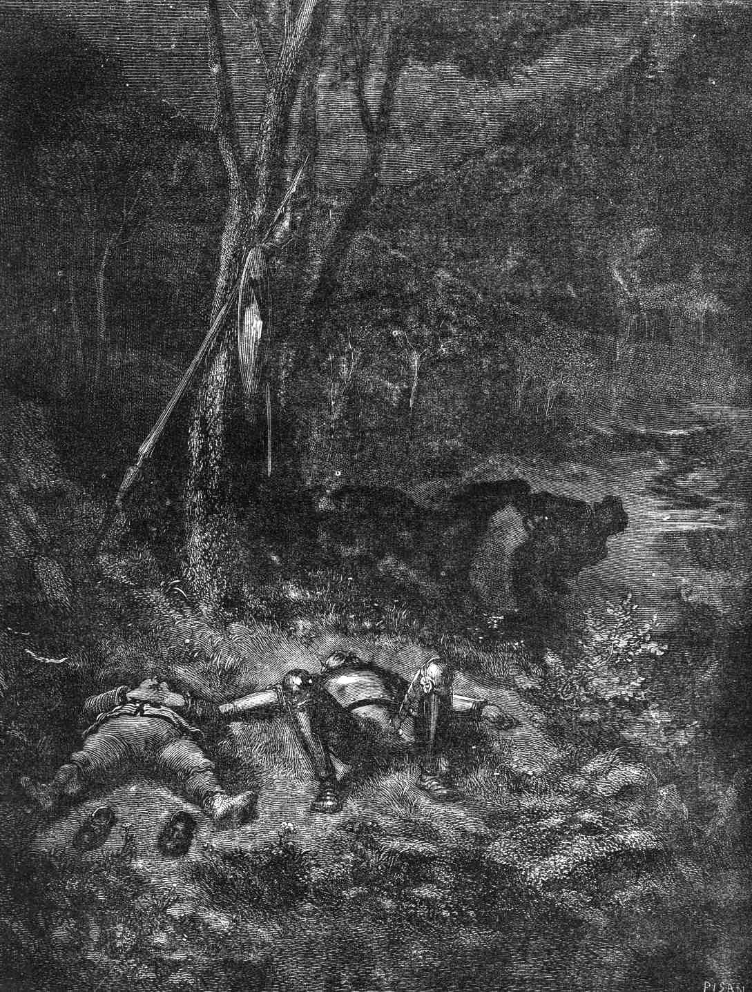 O roubo do jumento enquanto Dom Quixote e Sancho Pança dormem